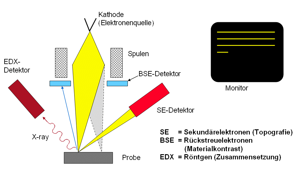 Funktionsprinzip REM-EDX (Rasterelektronenmikroskop - Energiedispersive Röntgenanalyse)